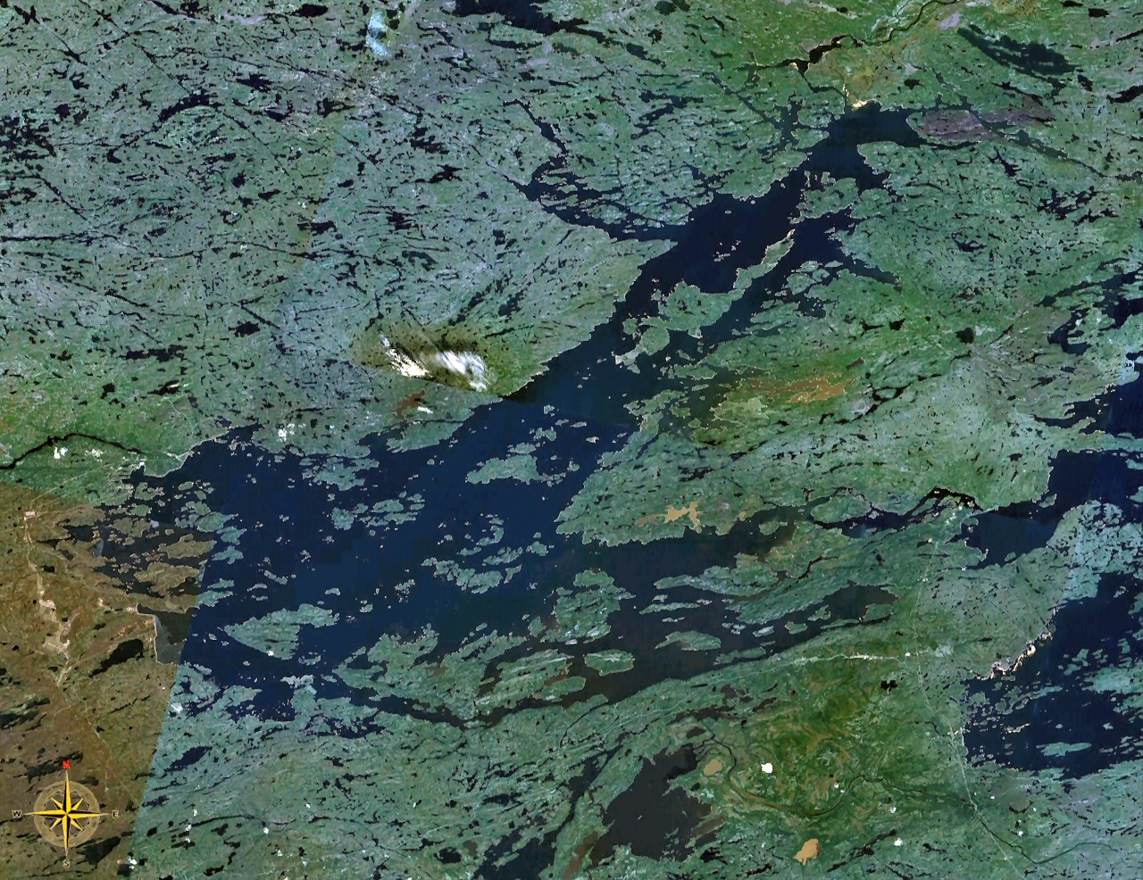 Robert-Bourassa Reservoir, Quebec, Canada